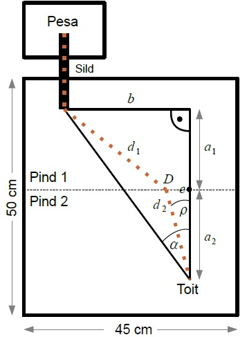 Ka sipelgad jälgivad Fermat' printsiipi